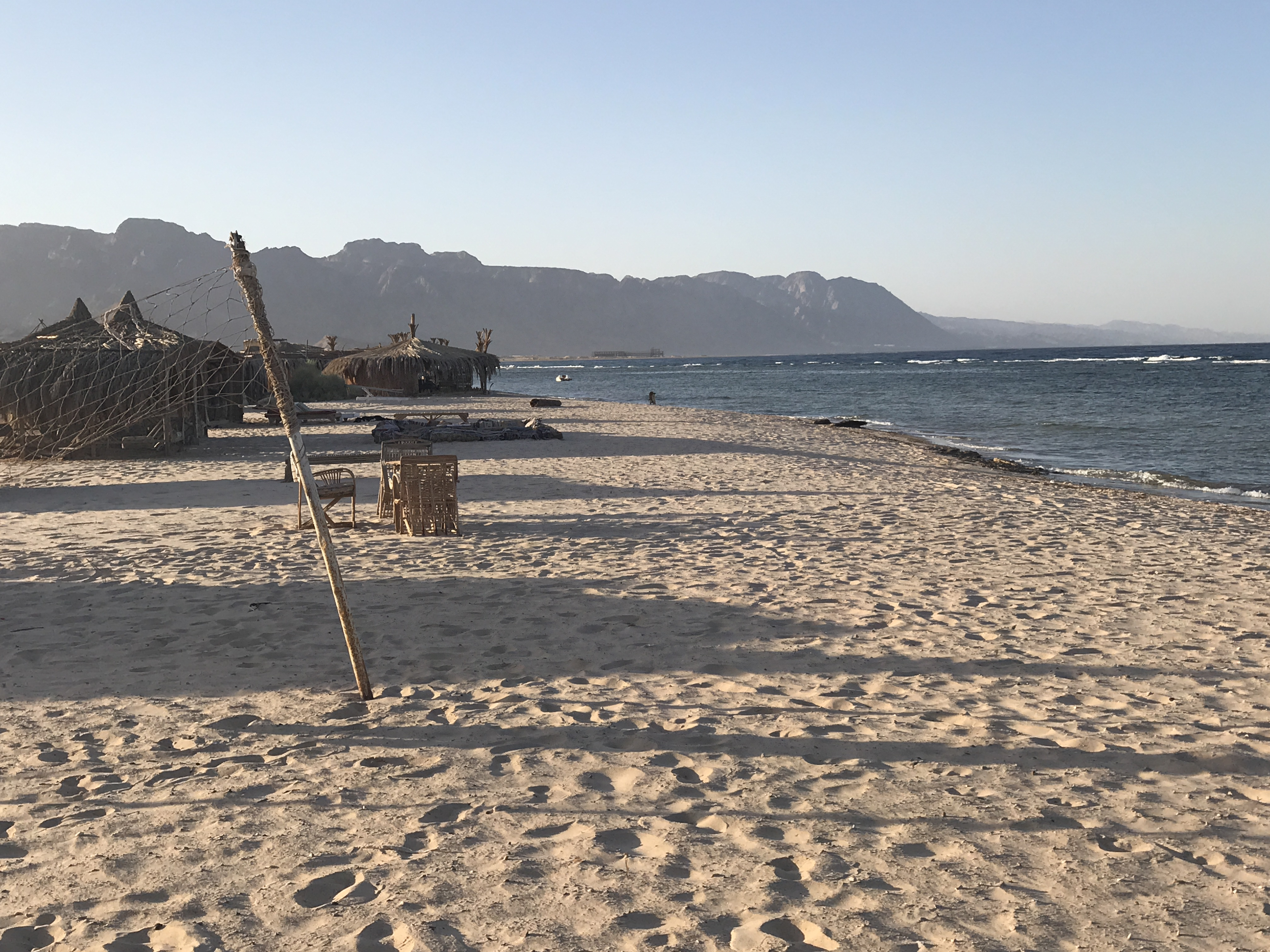 חוף מיאמי בביר סוויר - מדרום לצפון